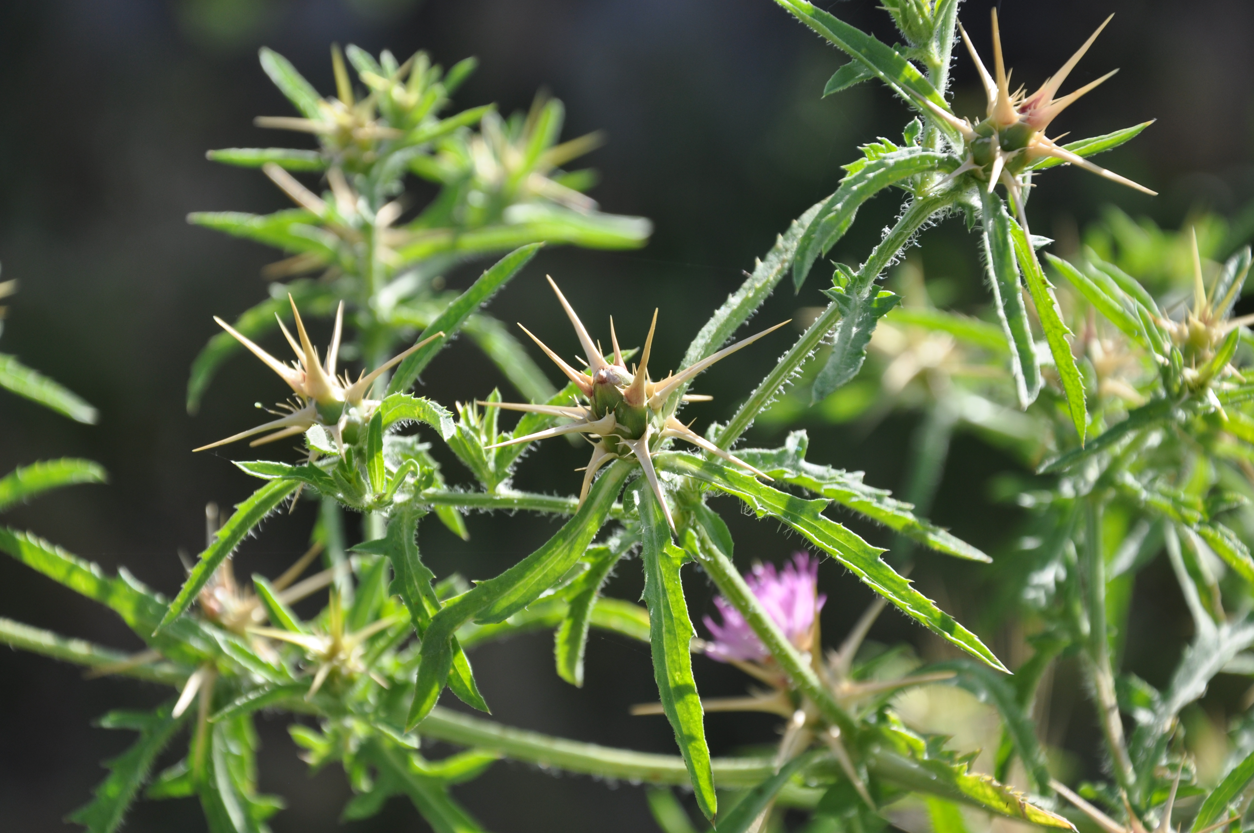 Cardo estrellado (Centaurea calcitrapa), Guareña-La Torre (Ávila), España.